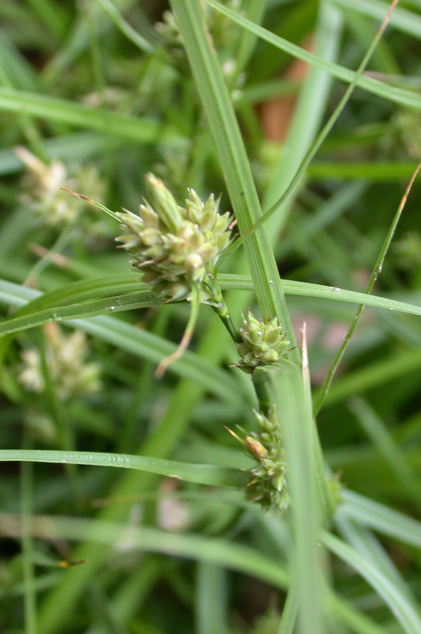 2003/05/16 和歌山白浜町：Dhirahama Town. Wakayama Pref. Japan